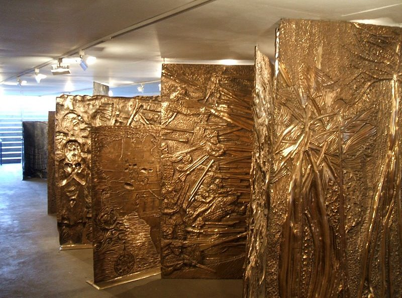 Painel Etnias, de Maria Bonomi, no acesso subterrâneo ao Memorial da América Latina, São Paulo, Brasil.